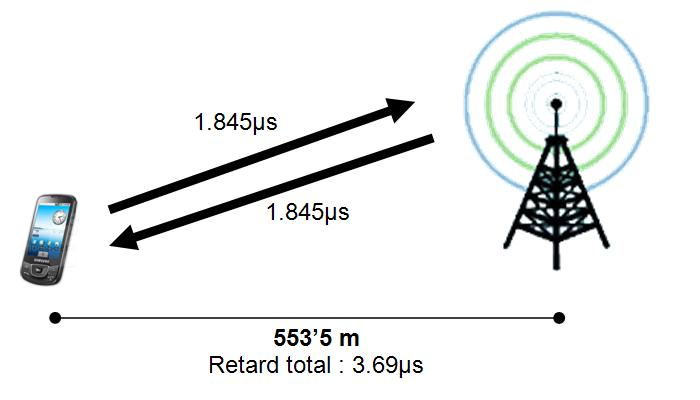 Esquema de la relació distància-retard de propagació per un bit GSM.